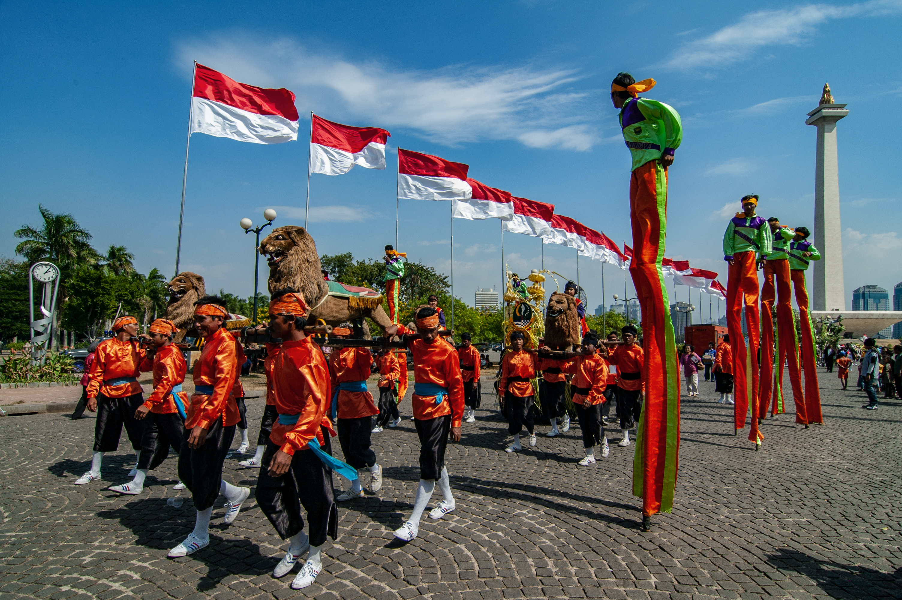 Provinsi Jawa Barat menampilkan kesenian Sisingaan dan Jelangkung dalam acara Parade Tari dan Budaya Nusantara di kawasan Monas, Jakarta, sebagai bagian dari peringatan Hari Ulang Tahun Kemerdekaan Republik Indonesia ke-63.